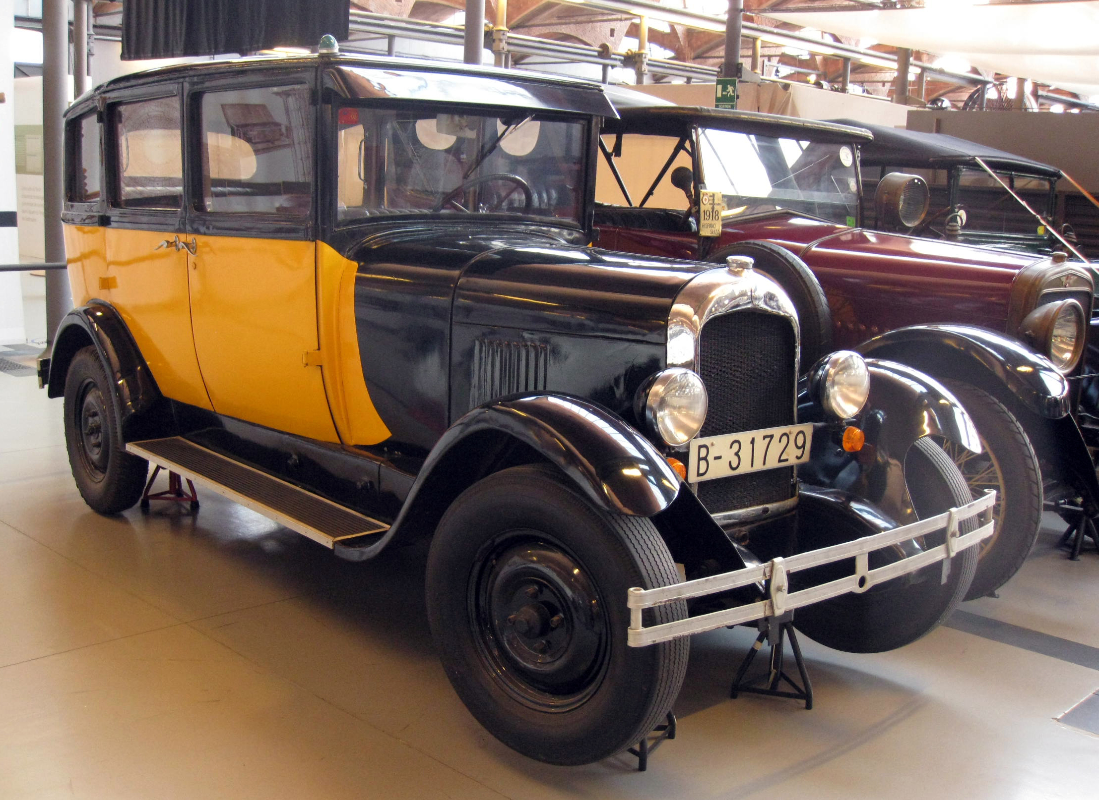 Fàbrica Aymerich, Amat i Jover (Terrassa) Object location41° 33′ 54.49″ N, 2° 00′ 28.14″ E